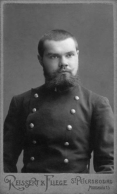 Петр Николаевич Черменский